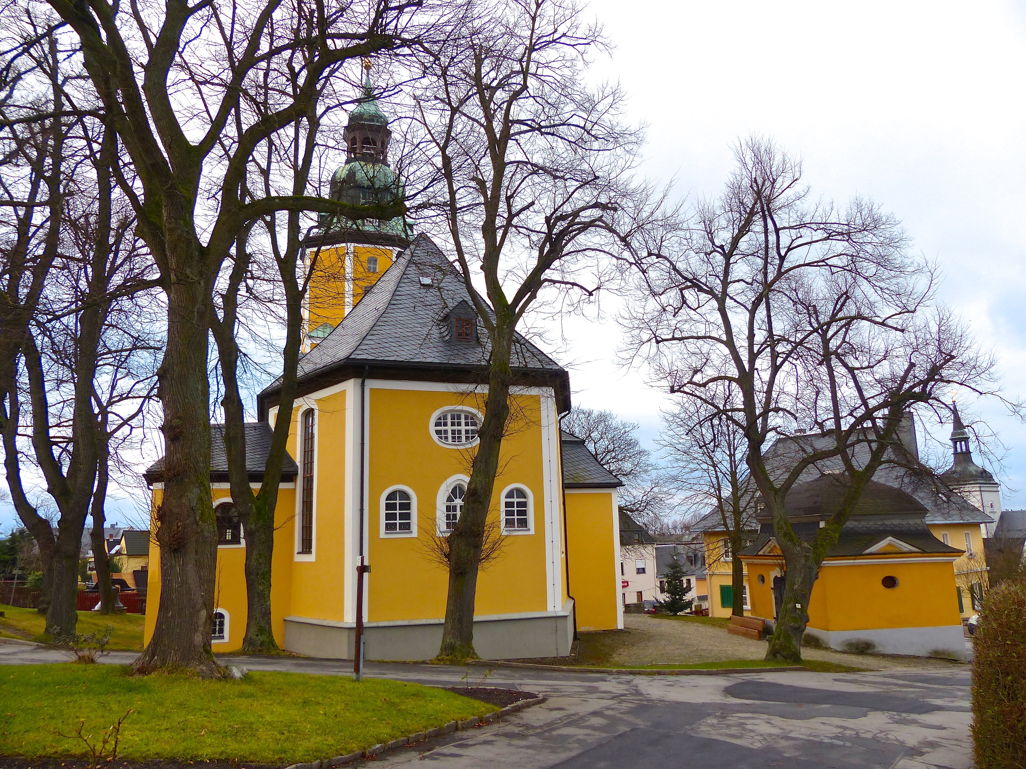 St. Johannis-Kirche (Scheibenberg)